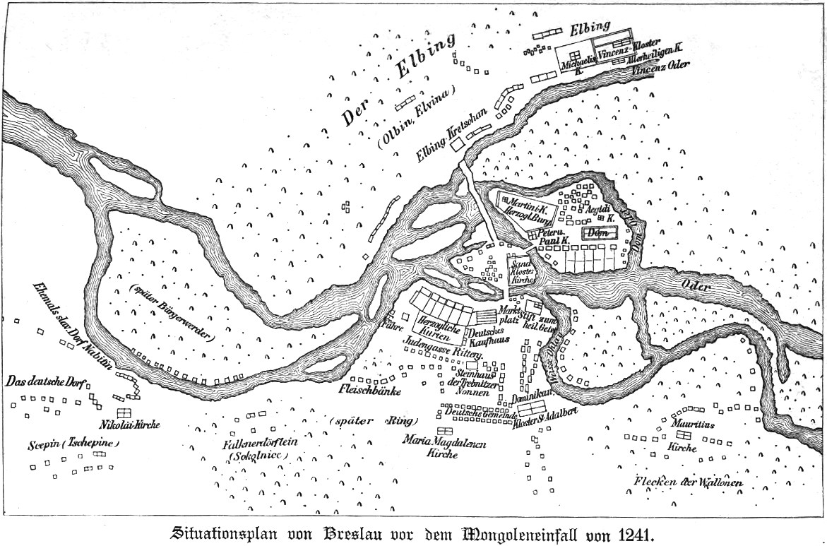 Plan sytuacyjny Wrocławia przed najazdem Mongołów w 1241